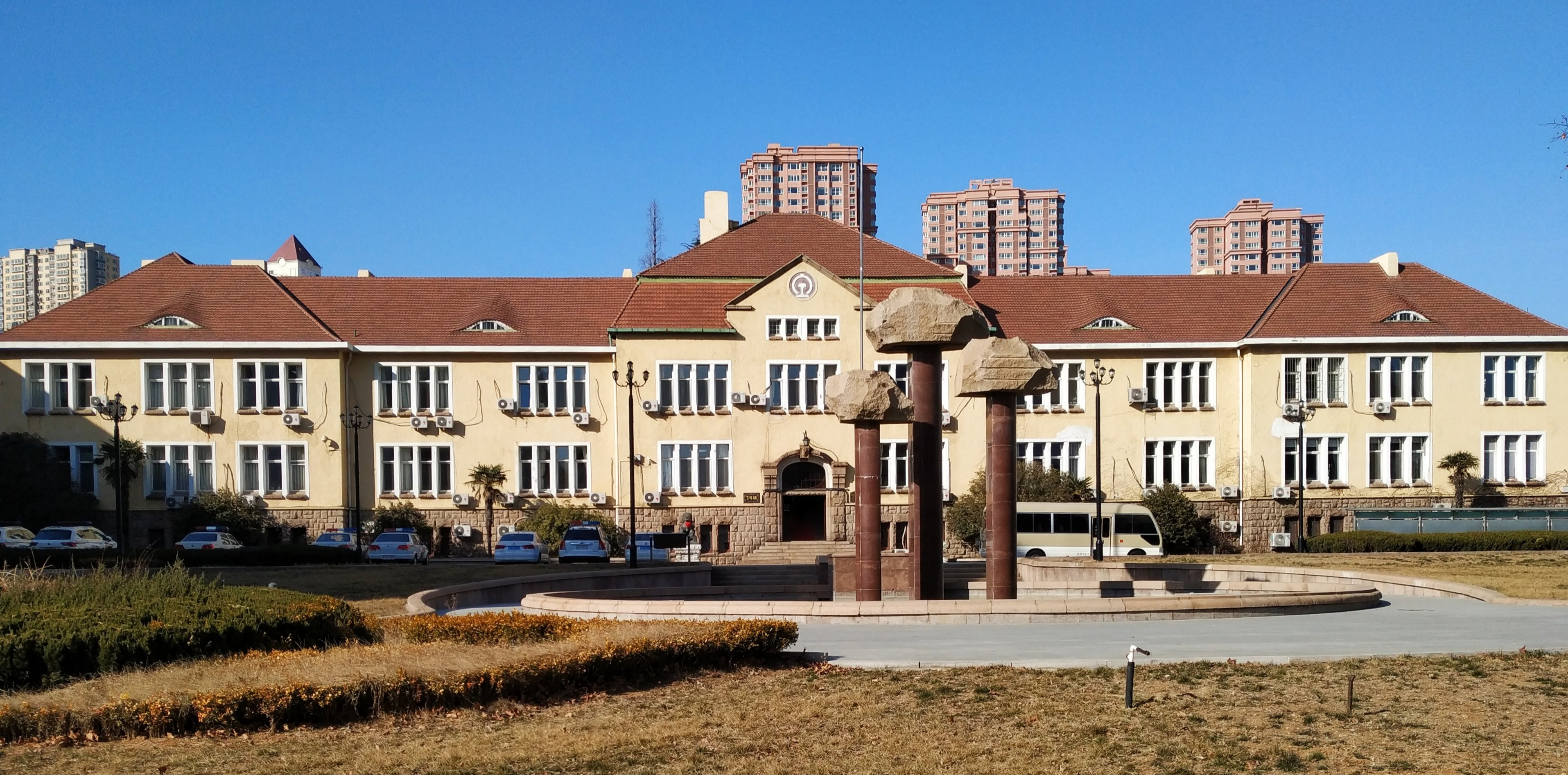 中文（中国大陆）: 朝城路2号，全国重点文物保护单位